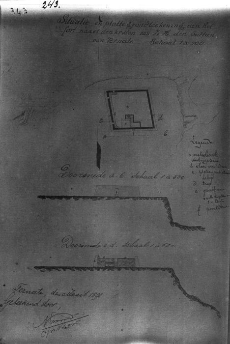 Foto. Situatieschets en plattegrond van het fort naast de kraton van de sultan van Ternate, Wichmann expeditie Molukken 1903